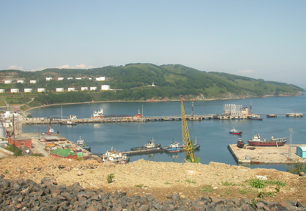 Nakhodka, Autumn, 2003, Rosneft oil terminal